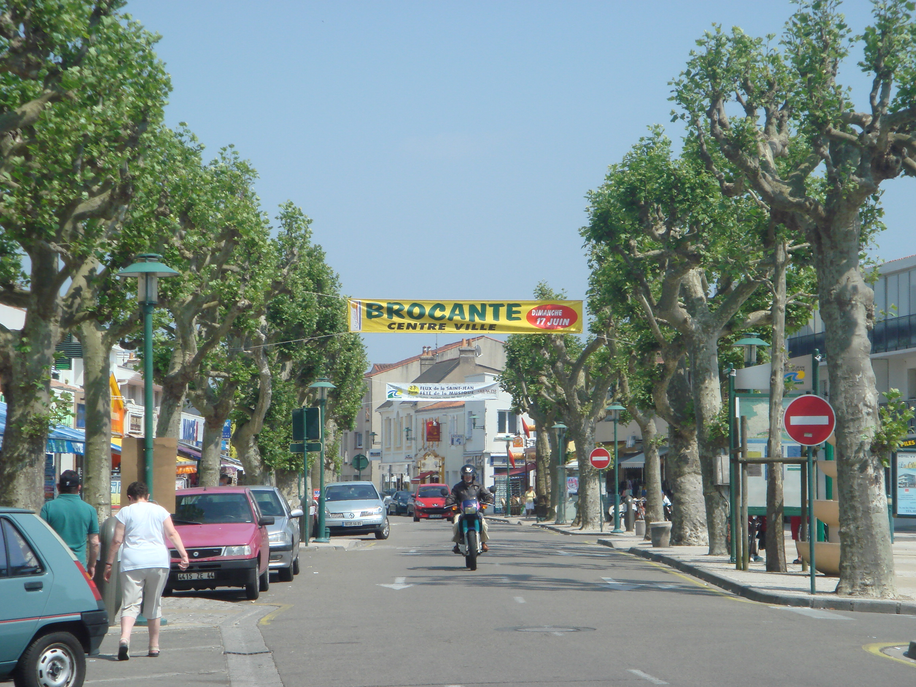 Centre-ville de Saint-Jean-de-Monts (Vendée, France).